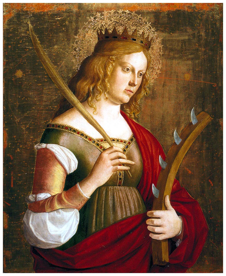 Cima da Conegliano, polittico di Olera - santa Caterina